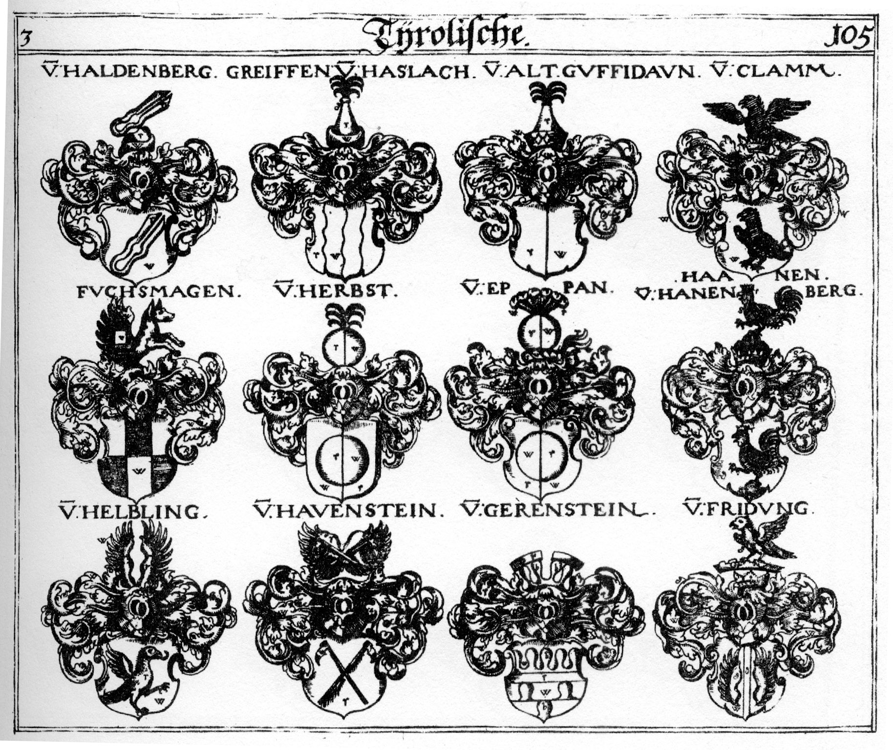 Siebmachers Wappenbuch, Tafeln der 9. Ausgabe 1701 und der 10. Ausgabe 1705, nach dem Faksimile von 1975. Tafel aus Teil 3.